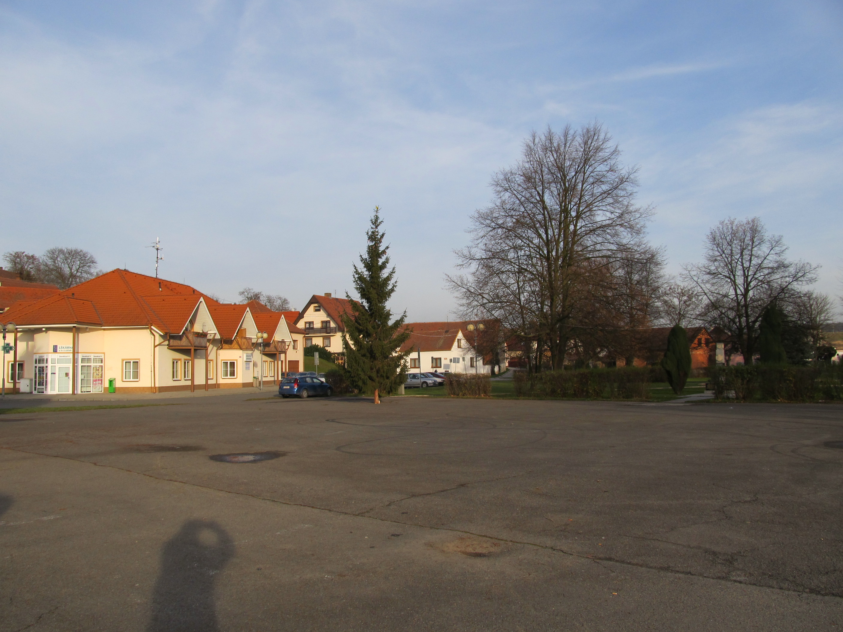 Chlumčany - náměstí Bohuslava Kašpara